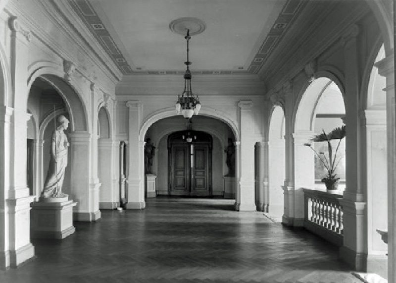 Die Wandelhalle im Obergeschoss des Logenhauses der Minerva zu den drei Palmen in Leipzig